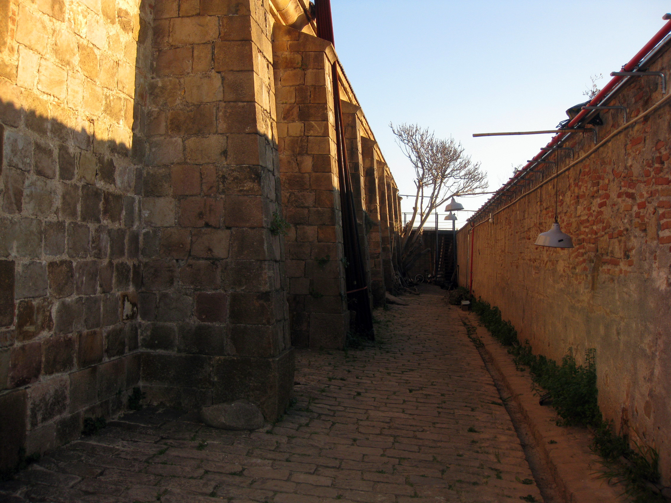 Polvorí i cos de guàrdia (Barcelona)